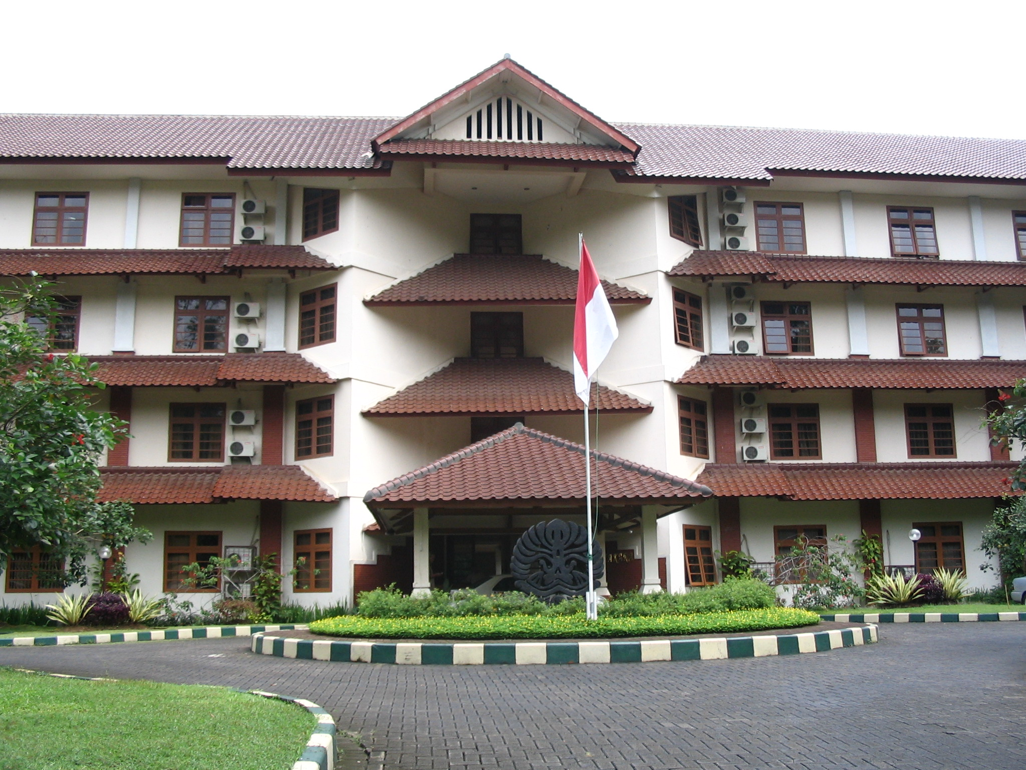 Universidad de Indonesia, Hotel Wisma Makara (Casa Makara), Campus de Depok, Gran Yakrta.